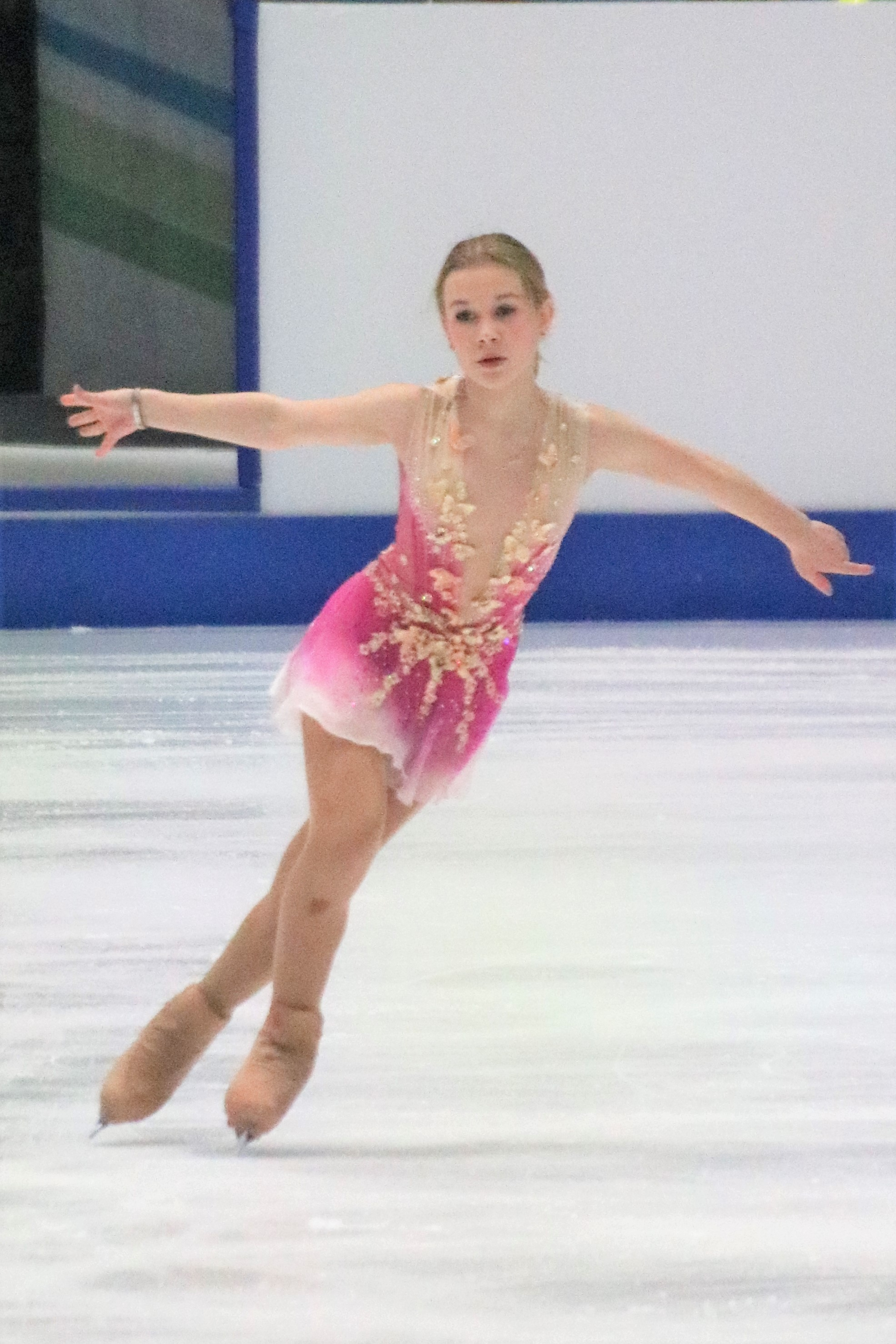 Екатерина Куракова (Польша) на чемпионате Европы по фигурному катанию 2020